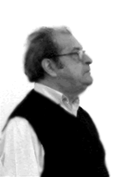 Foto Rogério Ribeiro